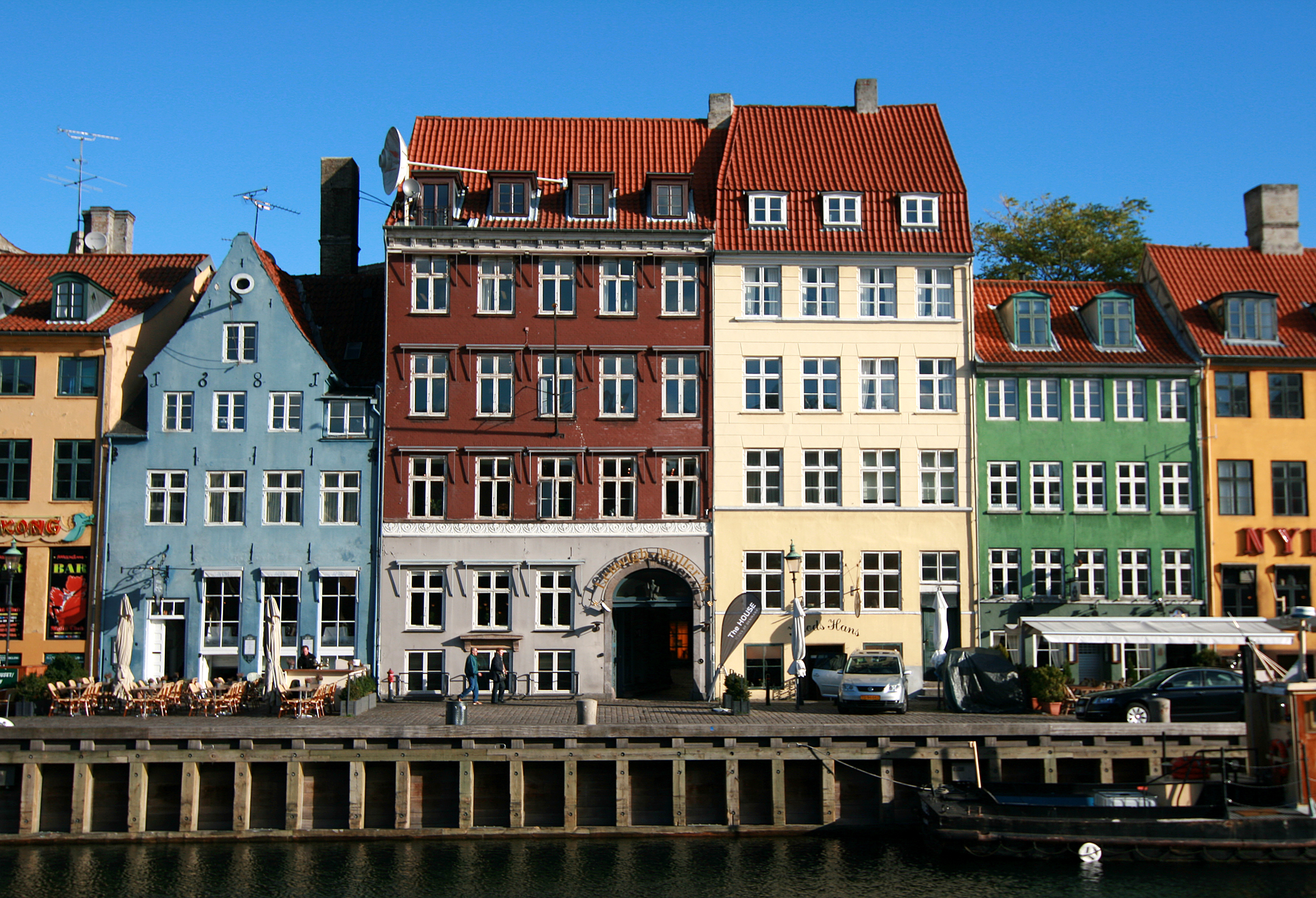 Nyhavn, København. Fra venstre: Nr. 9, bygget 1681. Nr. 11, bygget 1690. Nr. 13, bygget 1691. Nr. 15, bygget 1719. Alle fredet.